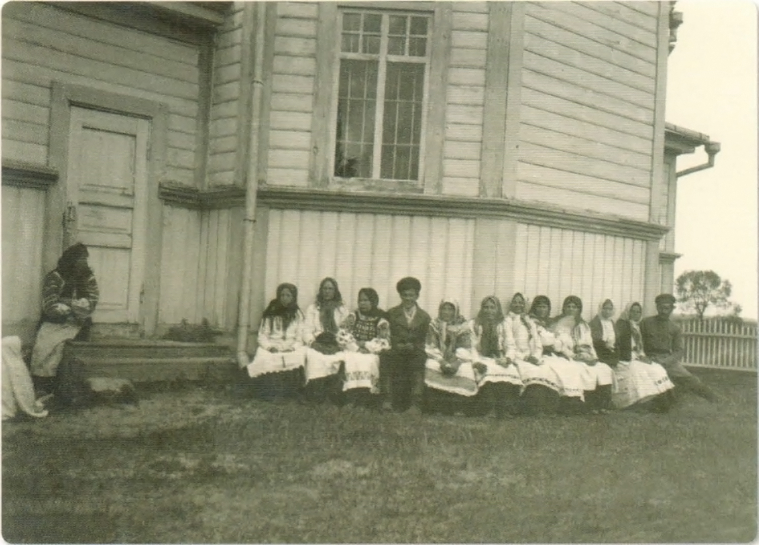 Беларуская (тарашкевіца): Шацілавічы (Šaciłavičy). Касьцёл